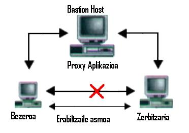 Aplikazioen Proxy-Gateways